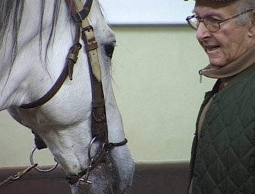 Fredy Knie senior spricht mit Pferd